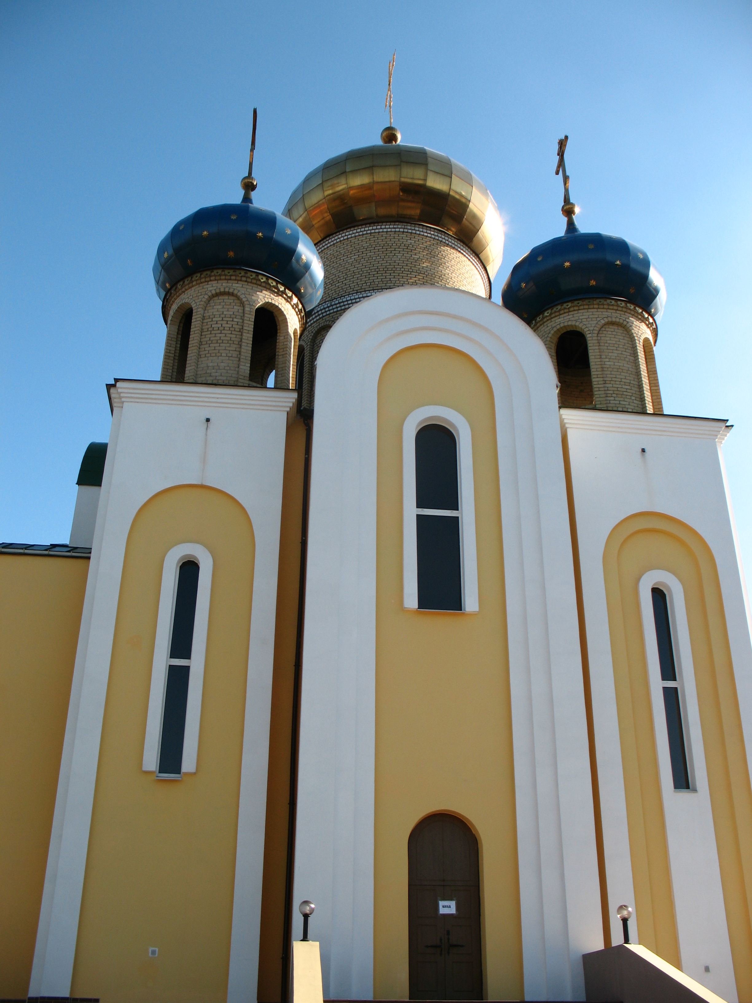 Собор Трёх Святителей (г. Советск)